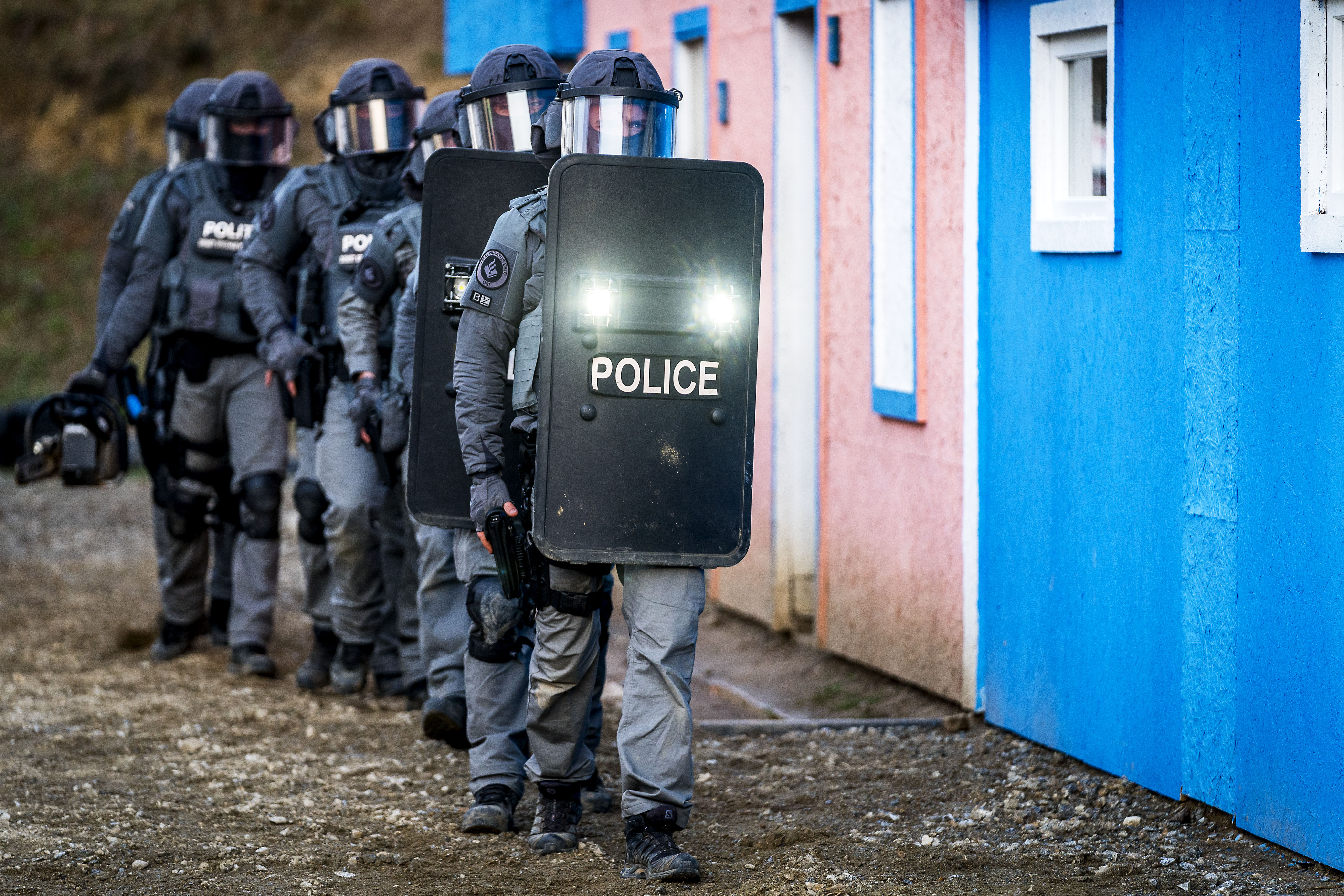 Polen, Ksiaz Wielkopolski, 3 februari 2020. Training van het arrestatieteam van de Brigade Speciale Beveiligingsopdrachten (BSB) van de marechaussee op de European Security Academy (ESA) Campus in Polen.